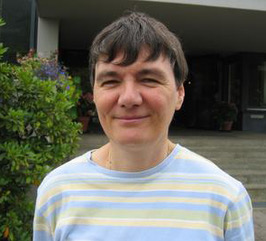 Photo recadrée de la mathématicienne Geneviève Raugel à Oberwolfach en 2004, d'après la photo by Renate Schmid, MFO